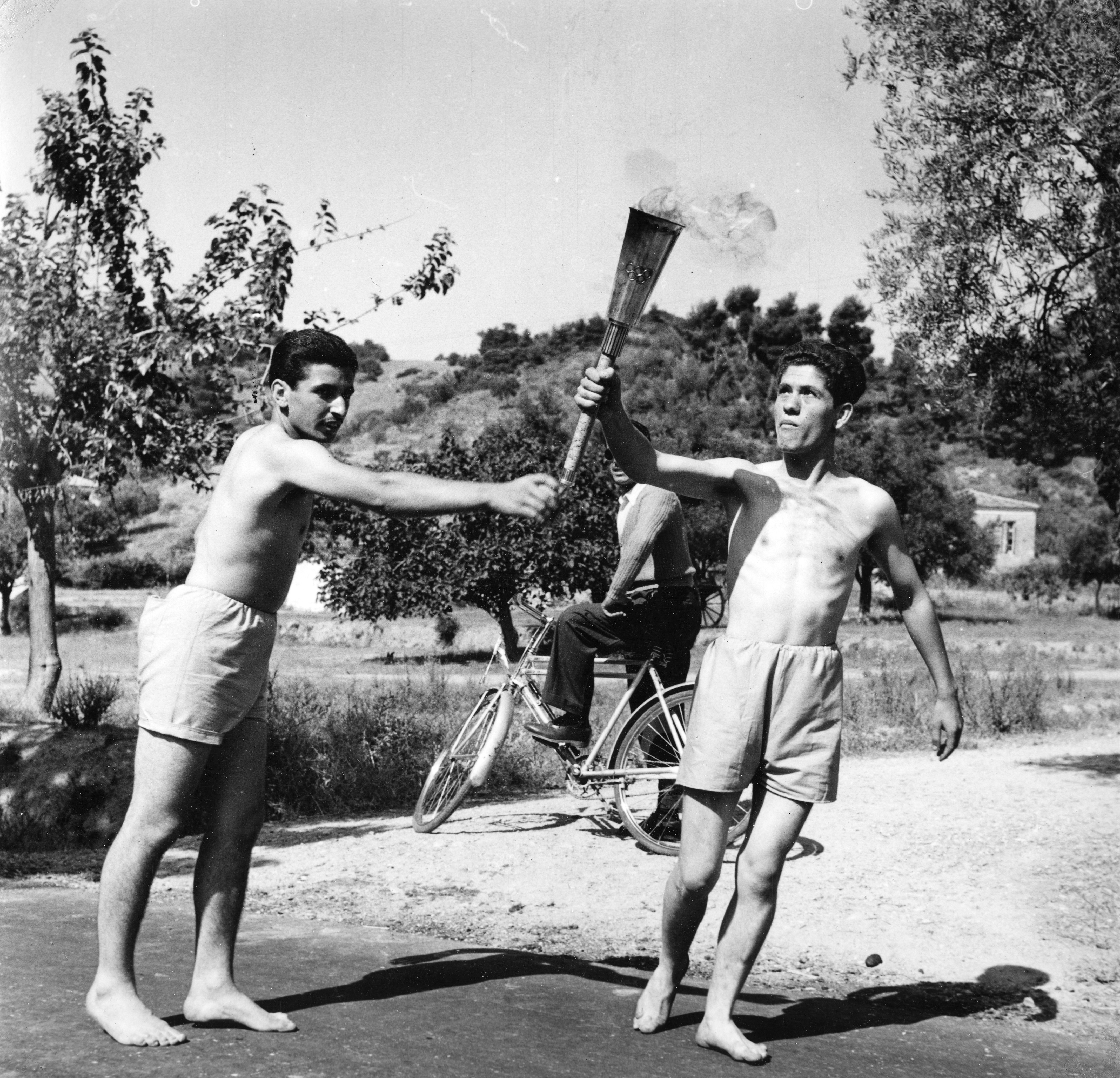 Viestinviejä vaihtuu soihtuviestin Kreikan osuudella kesäkuussa 1952.